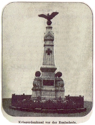 altes Kriegerdenkmal in Aue